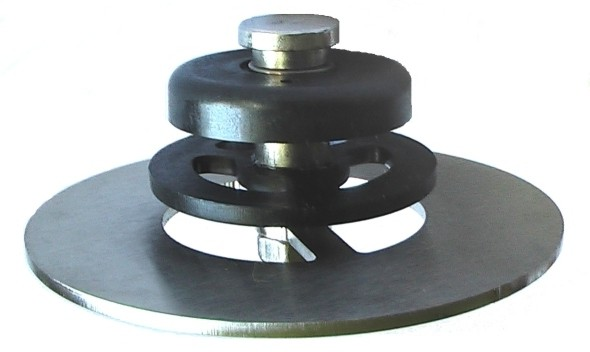 Einlegerückschlagventil (1,5mm Einbauhöhe ) für Solaranlagen, als Konventionsbremse, zum nachträglichen Einbau in Anlagen, bei Fehlzirkulationen. DN 20 - DN 32 mit und ohne Luftschleuse